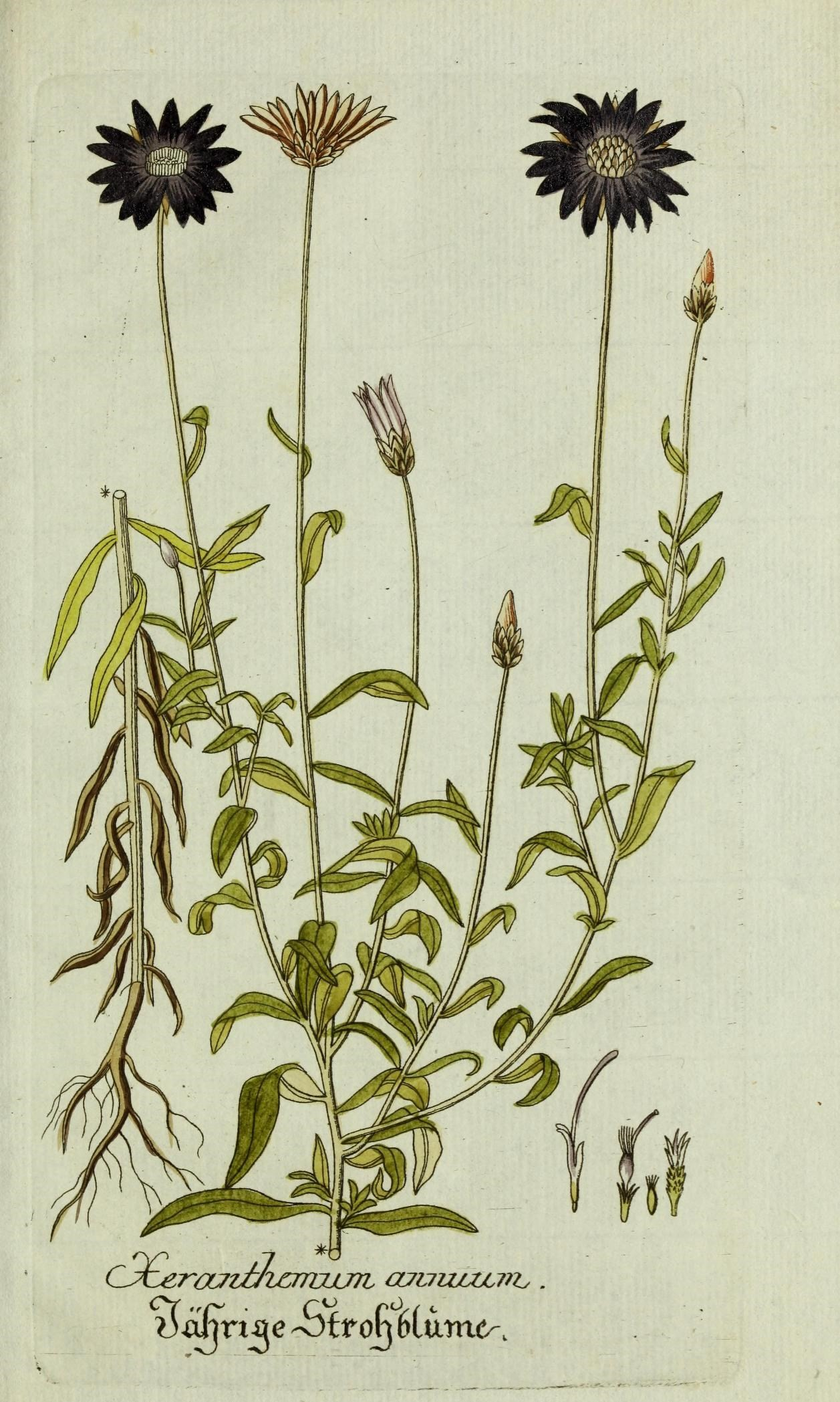 Plantarum indigenarum et exoticarum icones ad vivum coloratae, oder, Sammlung nach der Natur gemalter Abbildungen inn- und ausländlischer Pflanzen, für Liebhaber und Beflissene der Botanik /